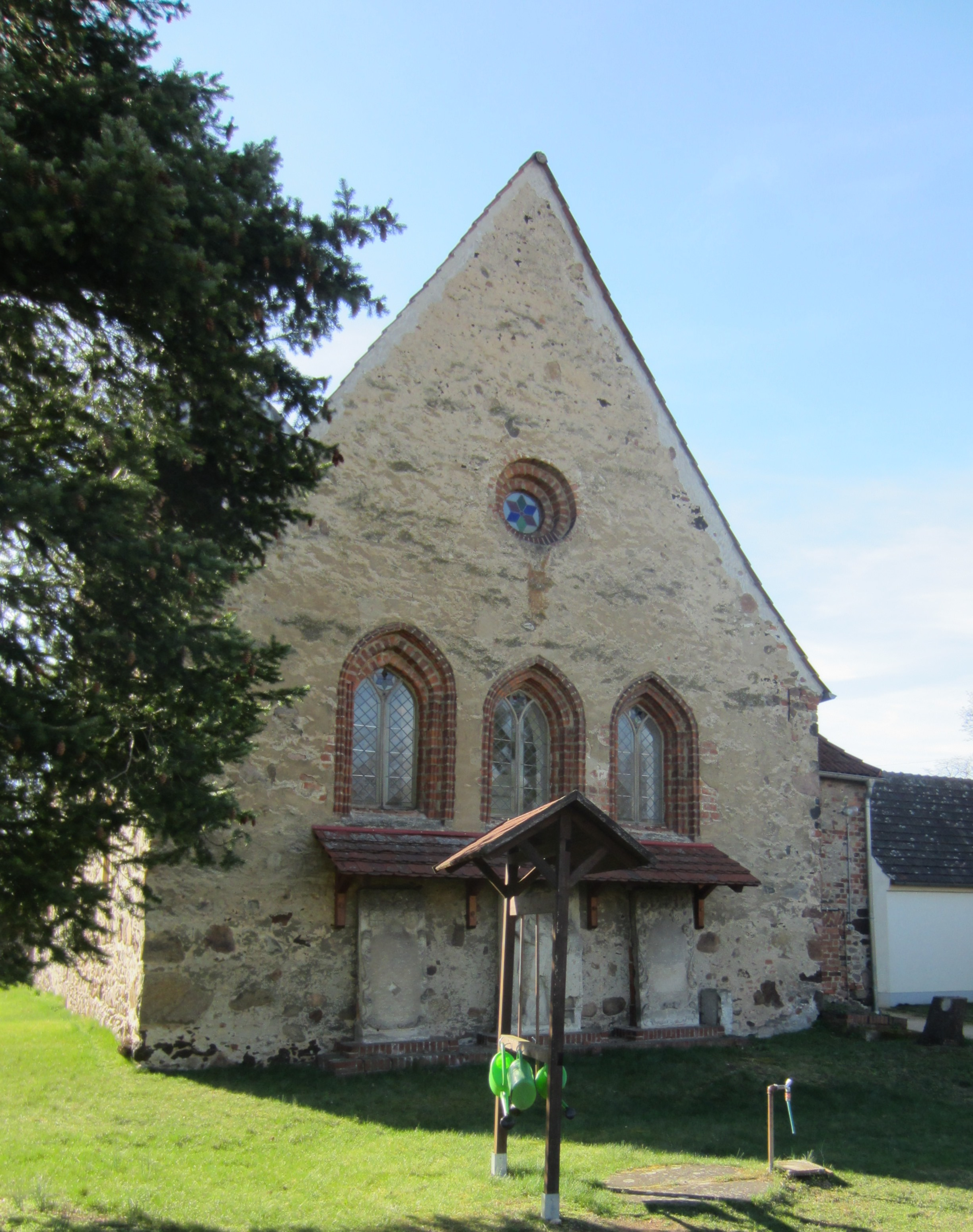 Schlabendorf, Stadt Luckau, denkmalgeschützte Dorfkirche, Ansicht von Osten